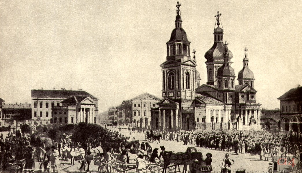 Сенная площадь в Петербурге. 1880-е годы